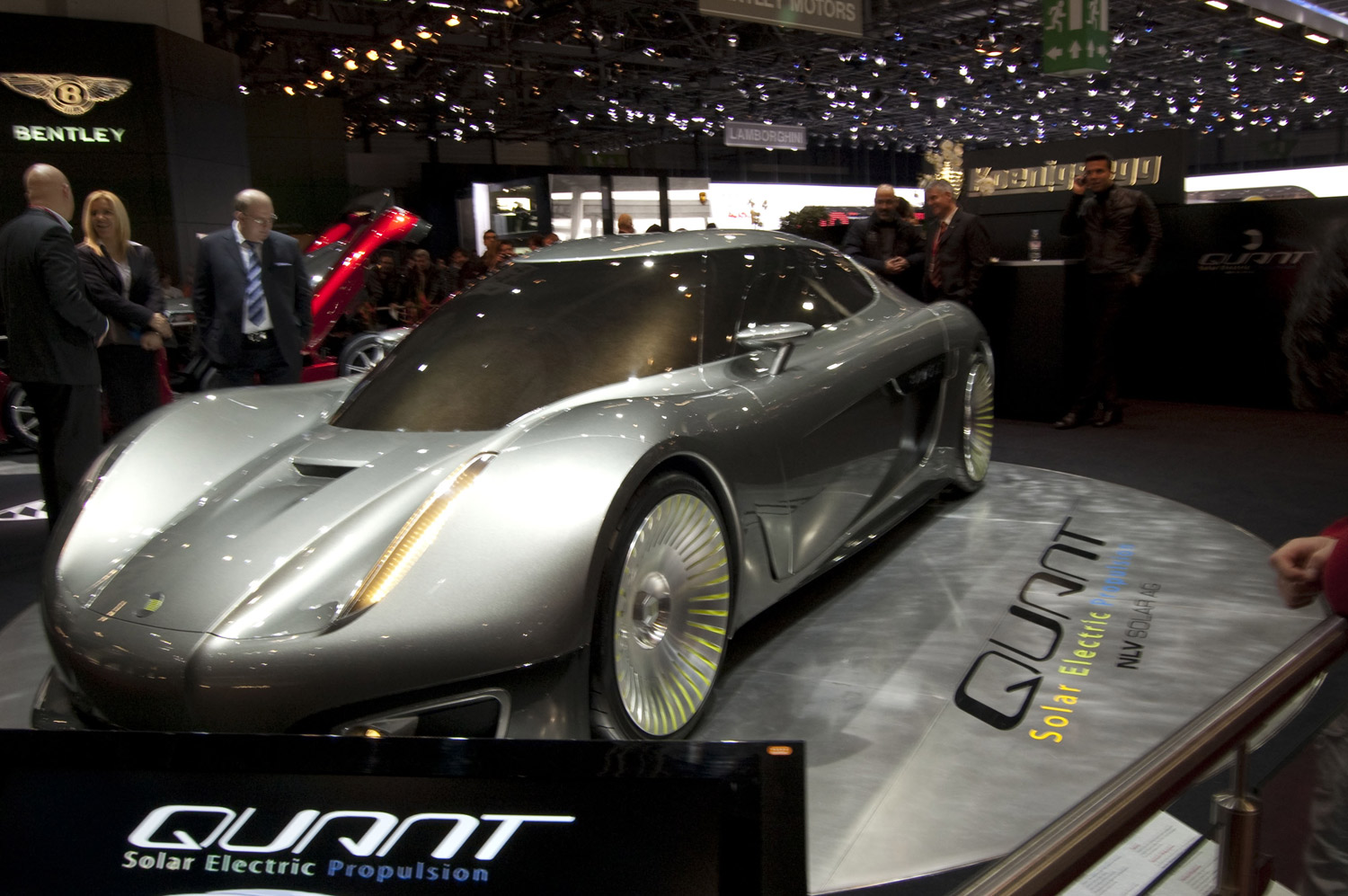 Koenigsegg Quant en el Salón de Ginebra 2009.